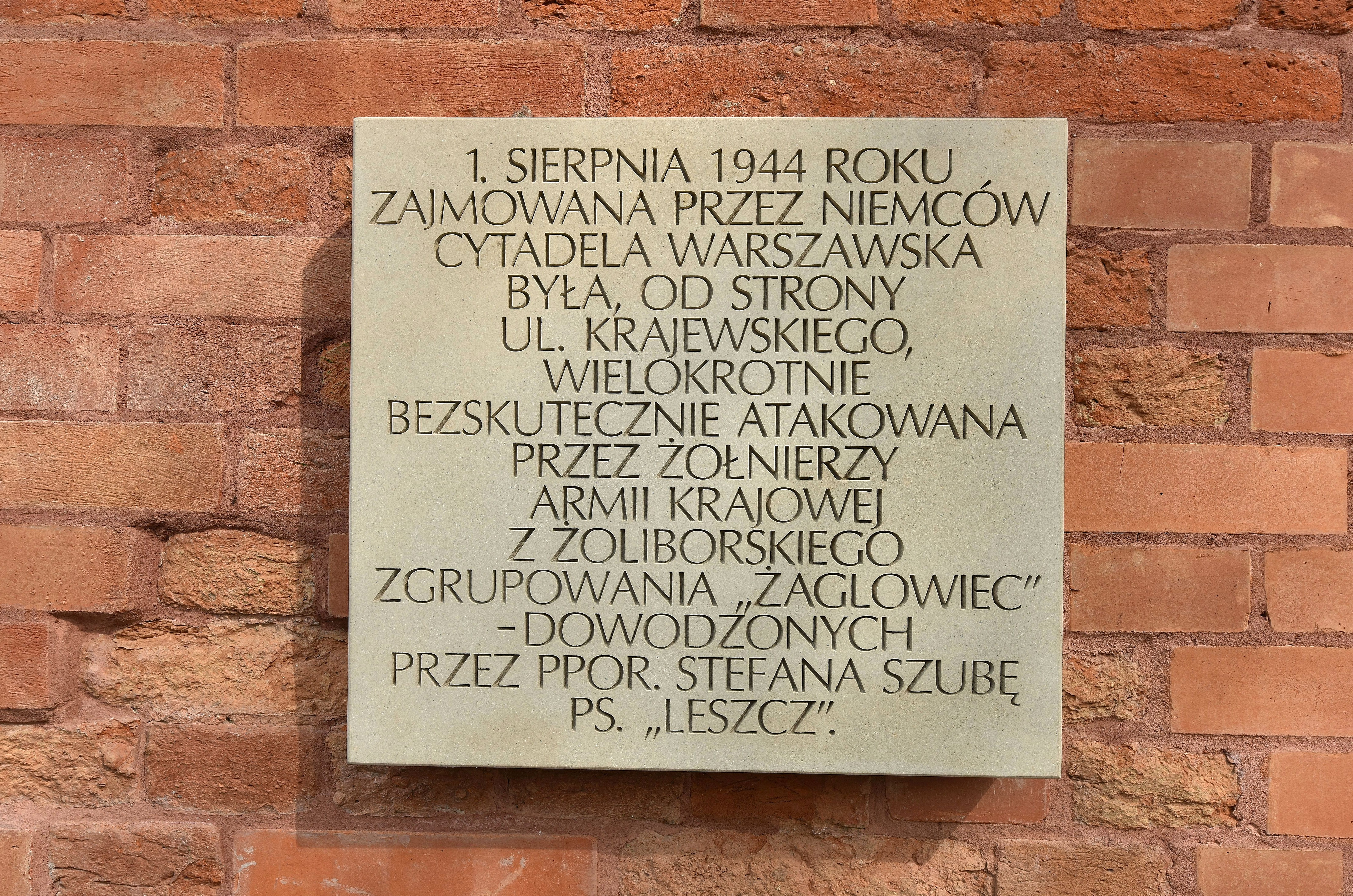 Tablica upamiętniająca zgrupowanie "Żaglowiec" na murze Cytadeli Warszawskiej (od strony ul. Krajewskiego)